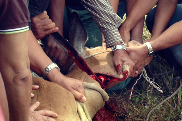 Upacara ibadah qurban di galing kem, kuantan. sebanyak 6 ekor lembu telah di sembelih